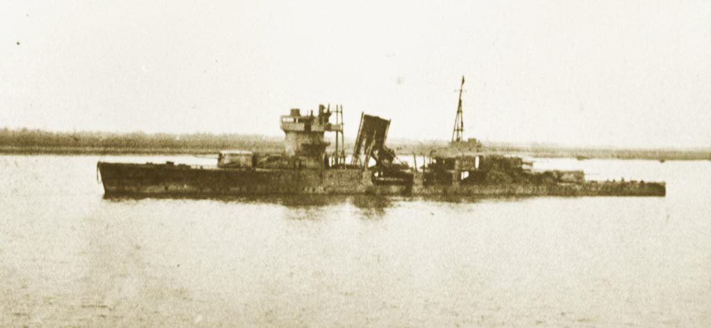 1938年三月二日浮揚起後的"平海"艦以自力駛往上海途中。